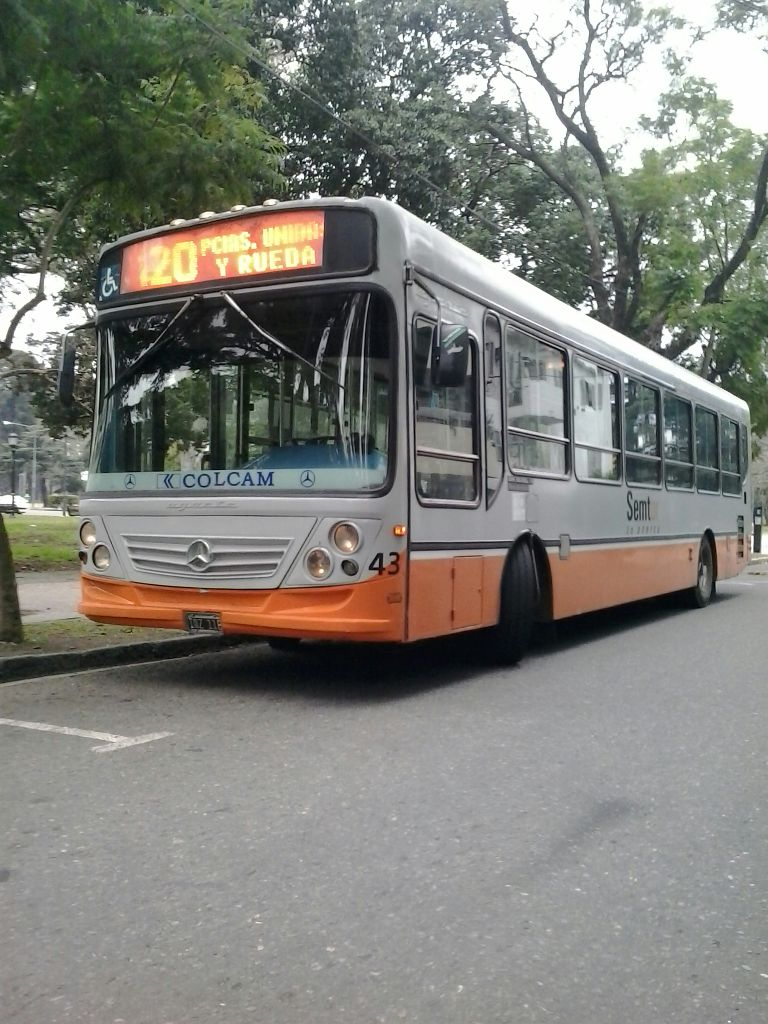 Mercedes-Benz OH carrozado por Ugarte